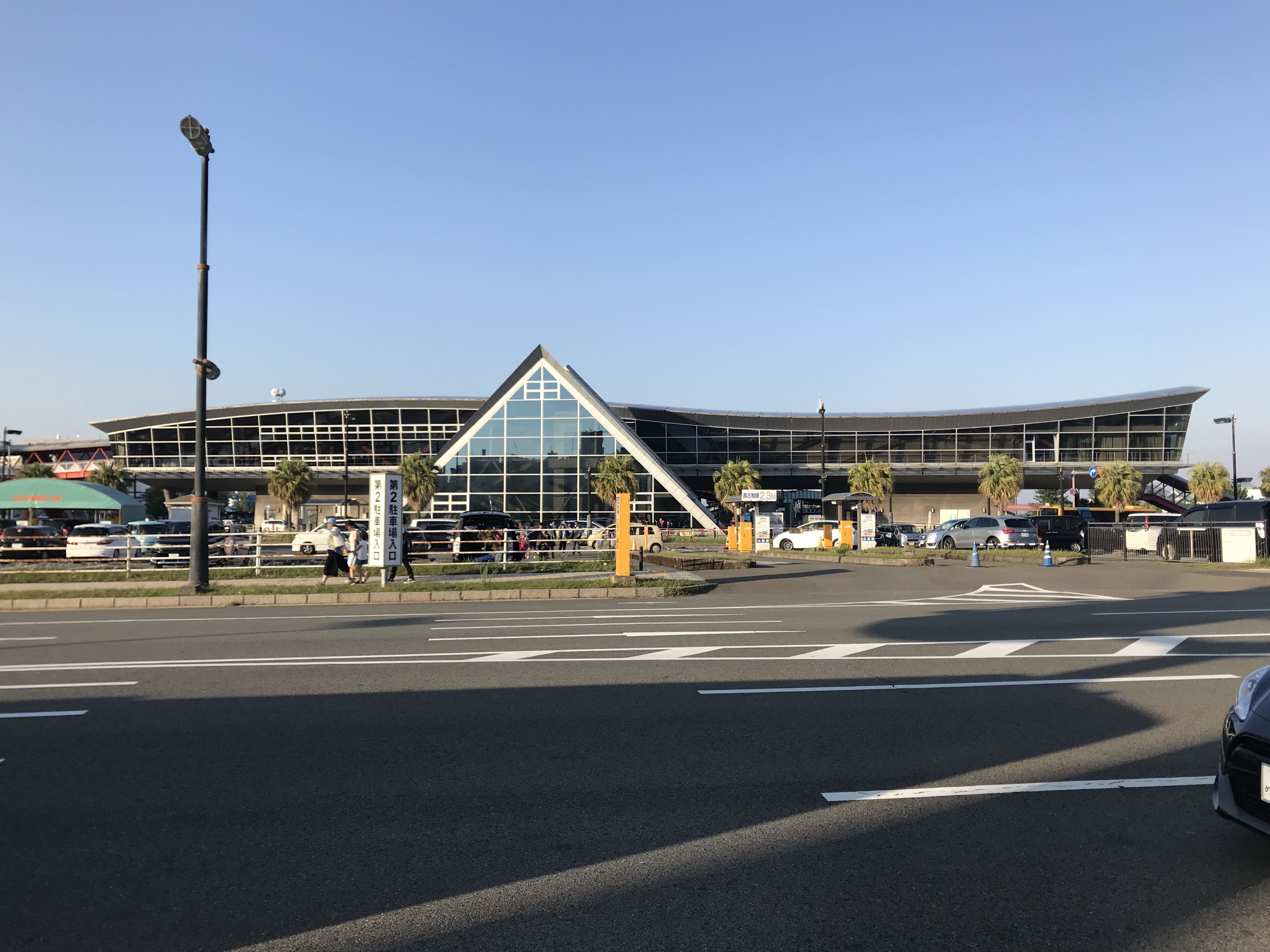 鹿児島港桜島フェリーターミナル